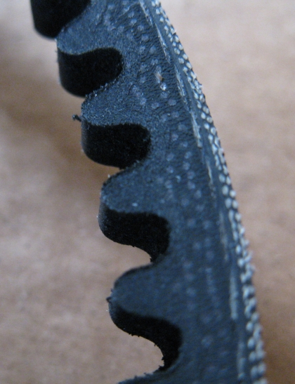 photo d'une courroie crantée type AVX